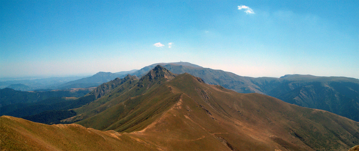 Билото на изток, погледнато от вр.Амбарица